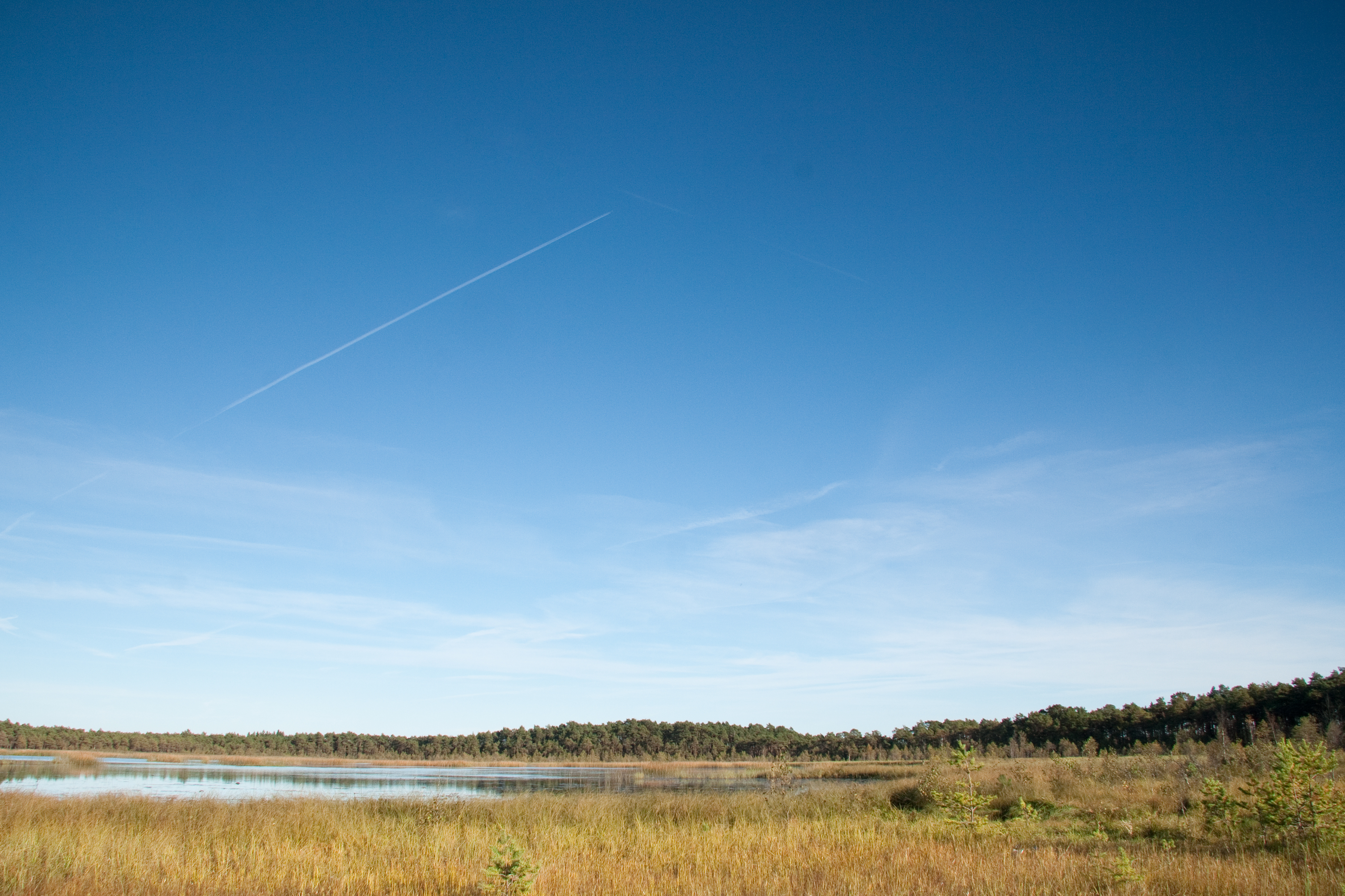 Seli järv Seli rabas Järvamaal